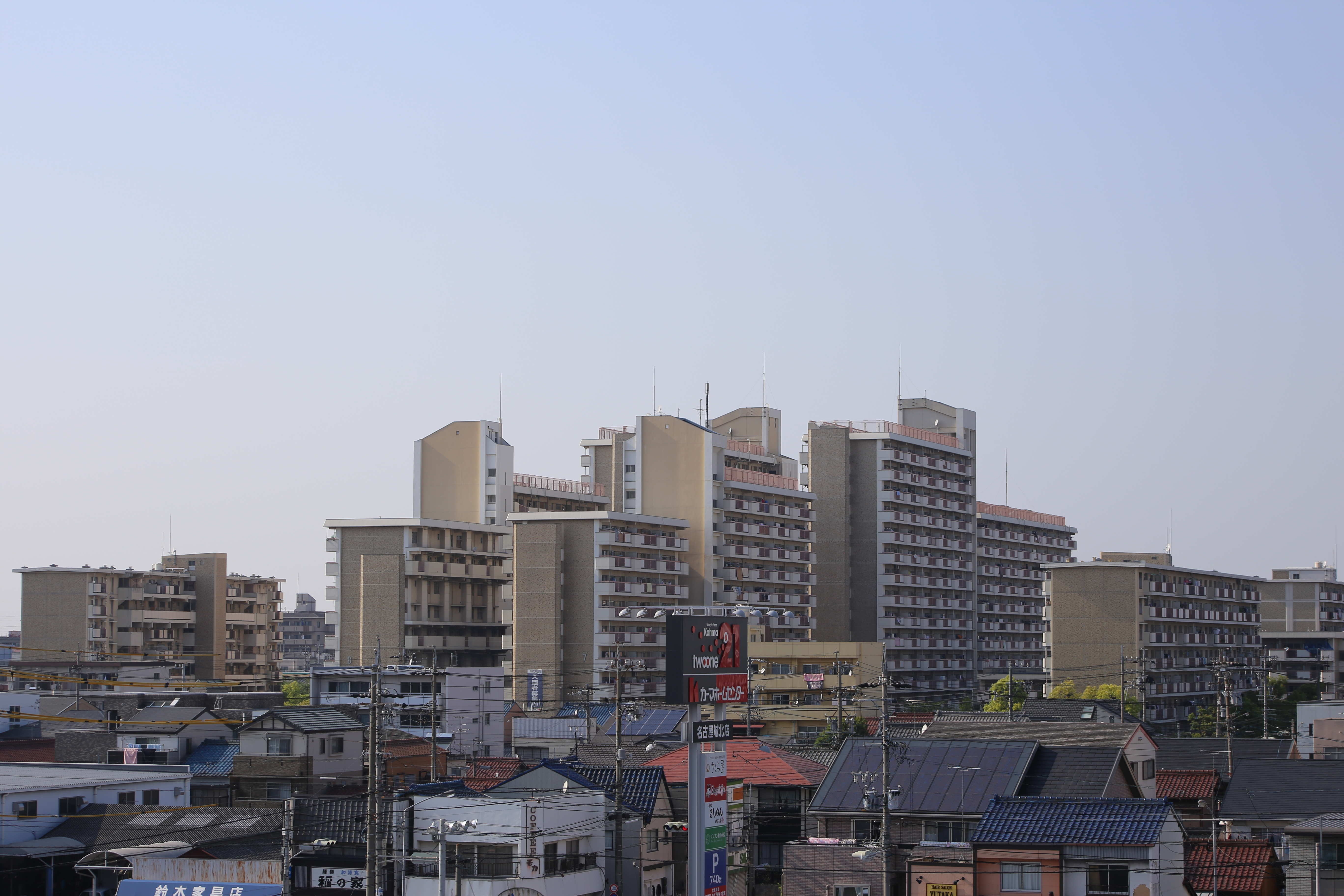 名古屋市北区水草町のUR水草団地を南東から望遠撮影